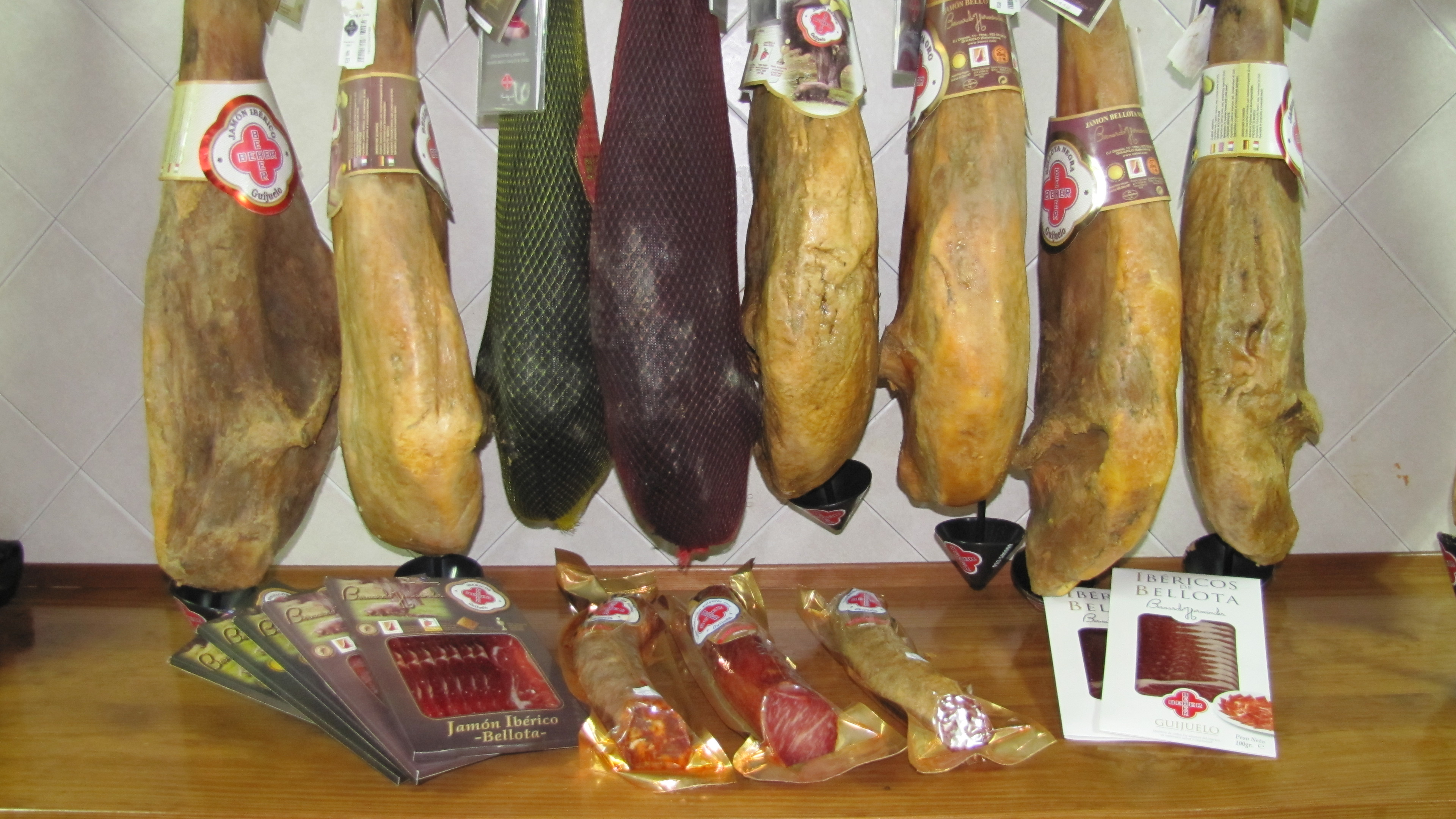 Exposición de embutidos y jamones en las instalaciones fabriles de BEHER, de la Denominación Jamón de Guijuelo (Salamanca - España).